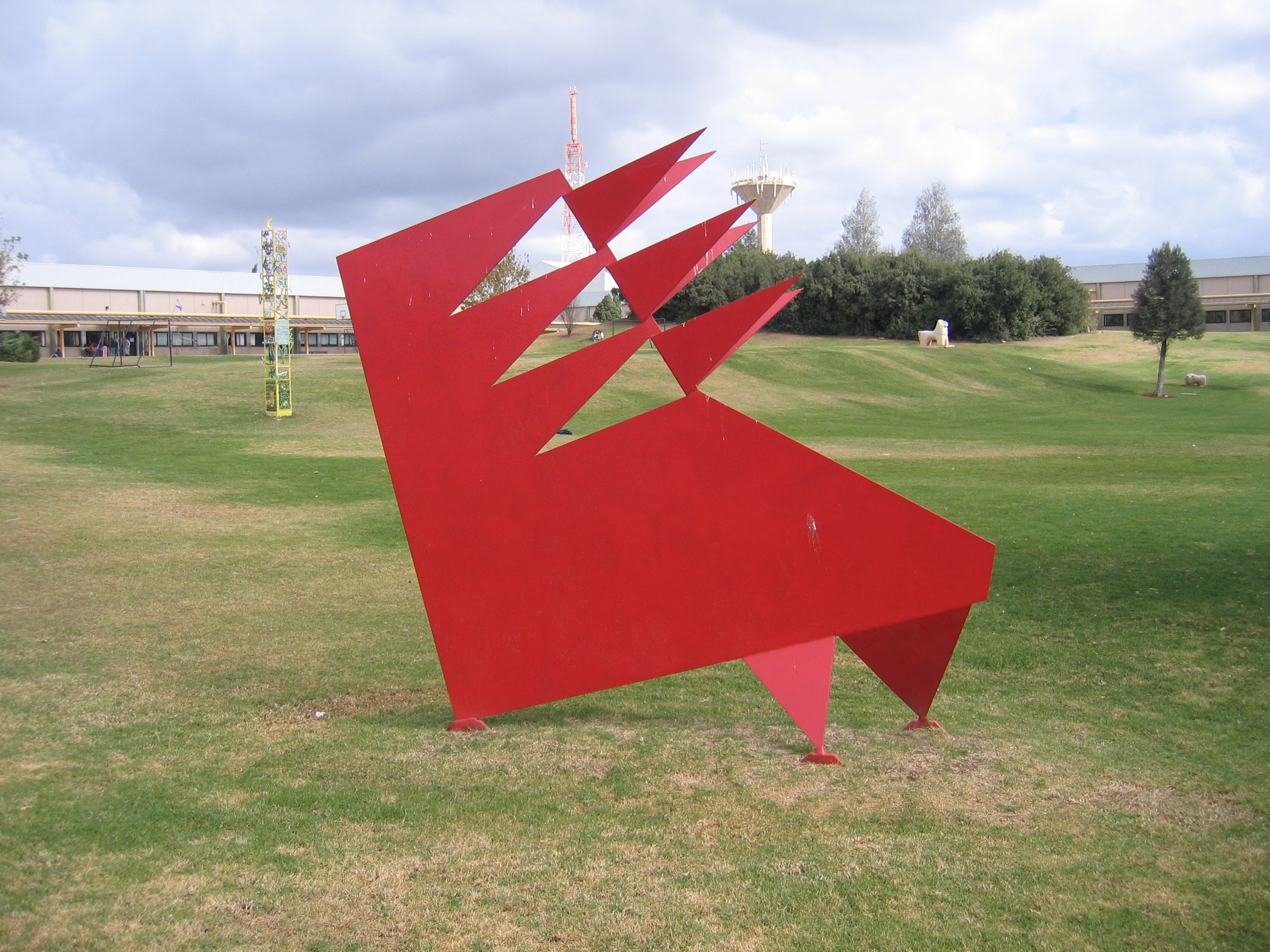 Sculpture